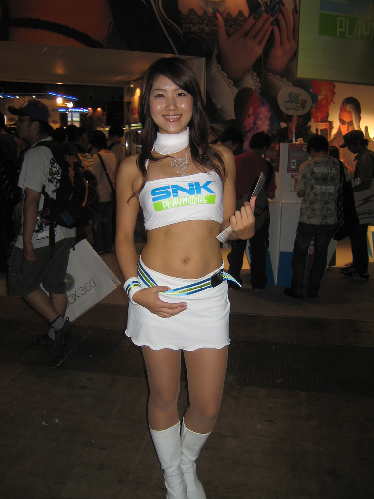 2005東京電玩展，SNK Playmore攤位的宣傳模特兒。